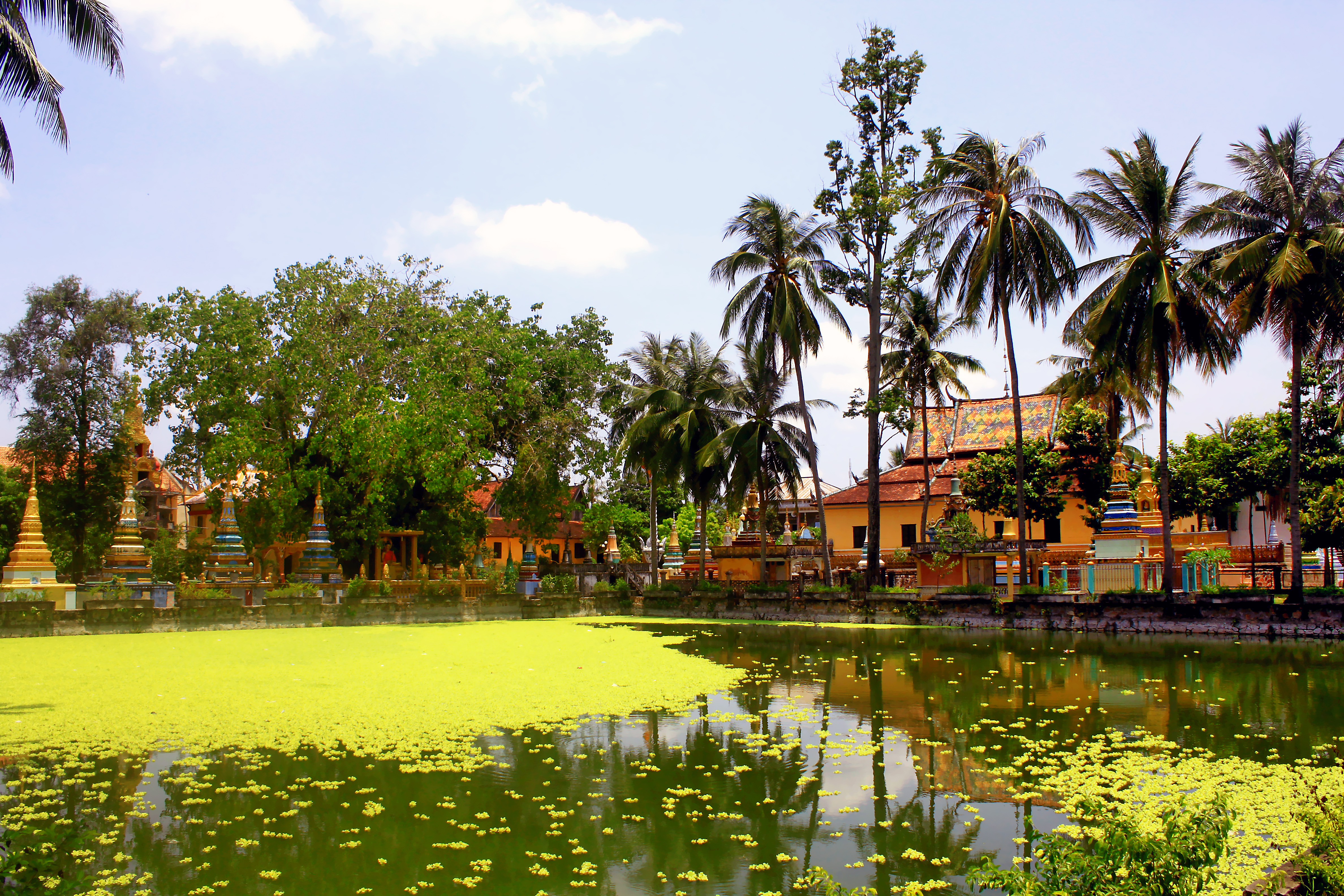 Chùa Xà Tón (Xvayton) là ngôi chùa tiêu biểu cho nghệ thuật kiến trúc chùa tháp của người Khmer ở Nam Bộ, hiện tọa lạc ở khóm 3, thị trấn Tri Tôn, huyện Tri Tôn, tỉnh An Giang, Việt Nam.